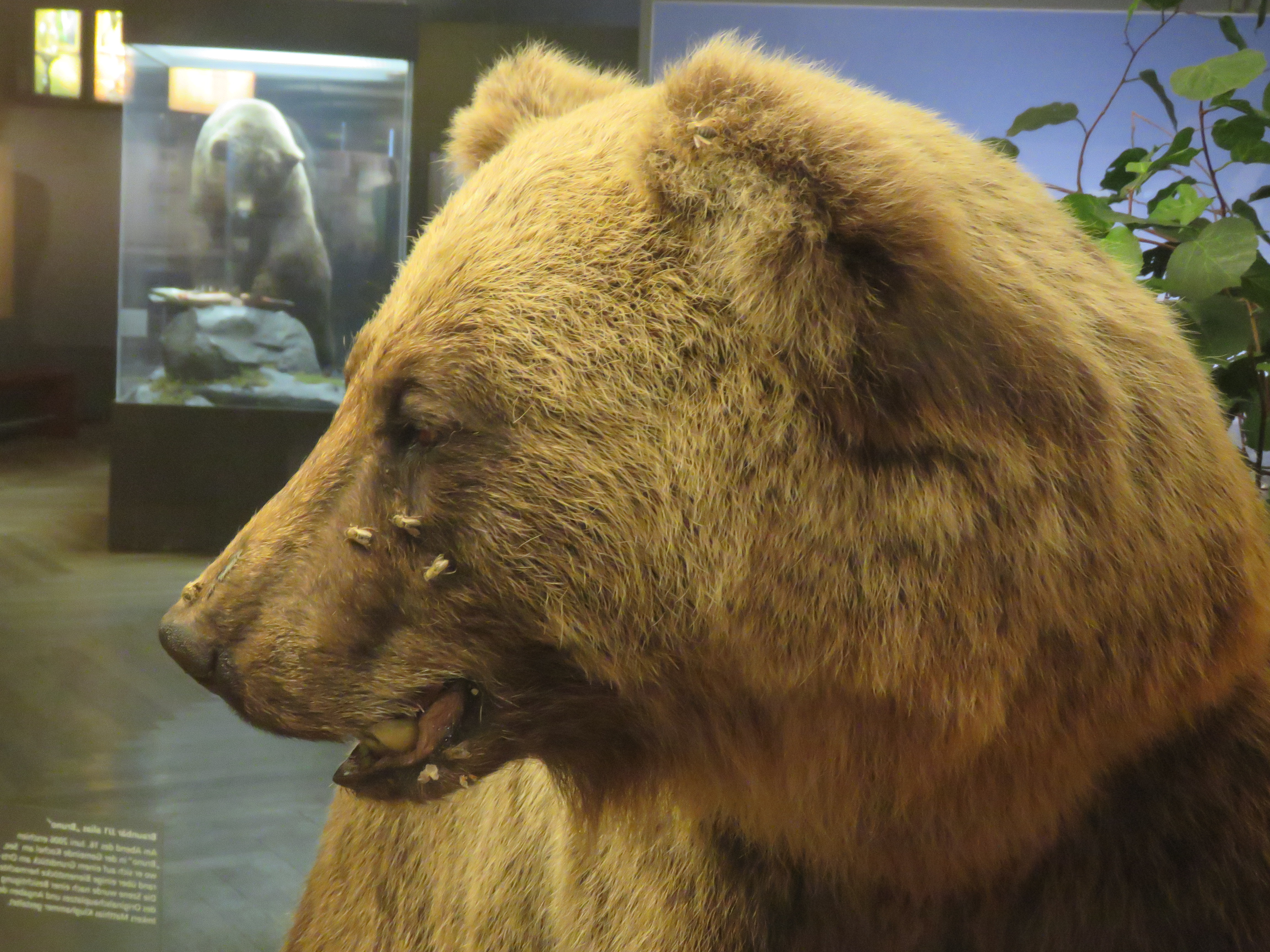 "Problembär" Bruno / JJ1 im Münchner Museum Mensch und Natur (Schloss Nymphenburg)